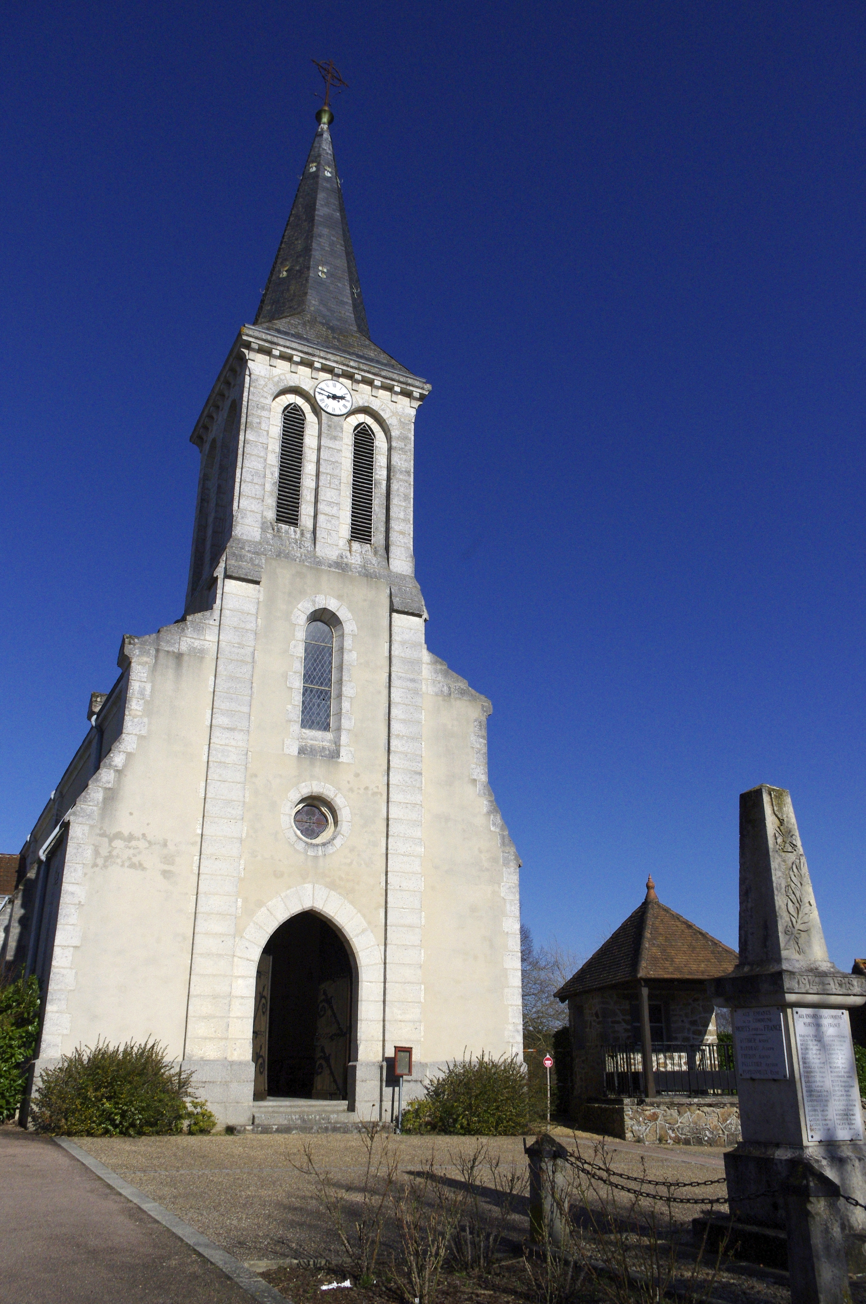 Champs-Romain, Dordogne, l'église et le monument aux morts